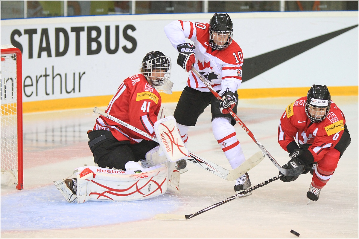 Florence Schelling (gardienne, à gauche), sous la menace de Gillian Apps (au centre), pendant que Julia Marty, à droite, se jette pour repousser le puck.